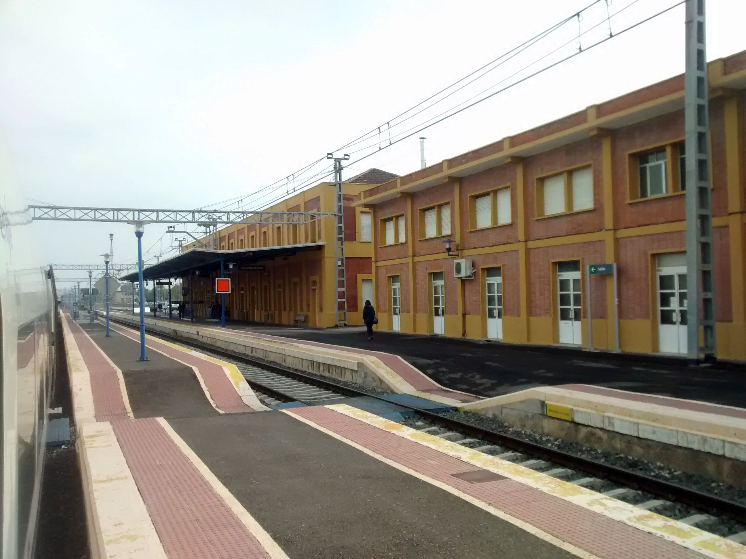 Edificio principal y andénes de la estación